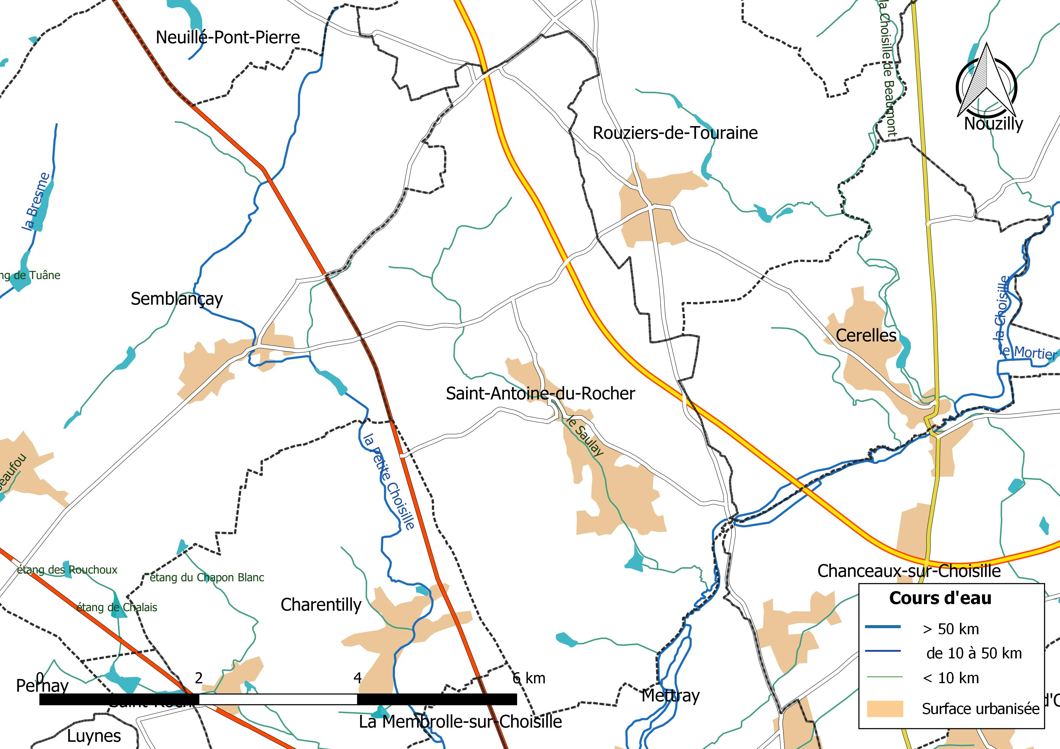 Carte du réseau hydrographique de la commune de Saint-Antoine-du-Rocher (France).